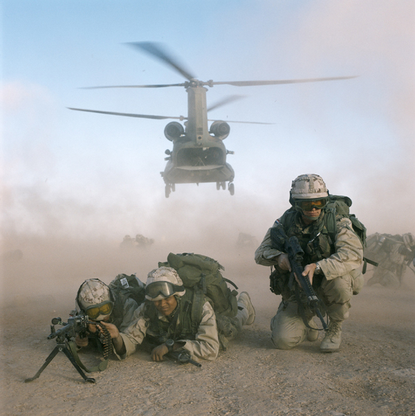 Militairen van het Korps Mariniers beveiligen direct de omgeving nadat ze door een transporthelikopter zijn gedropt.